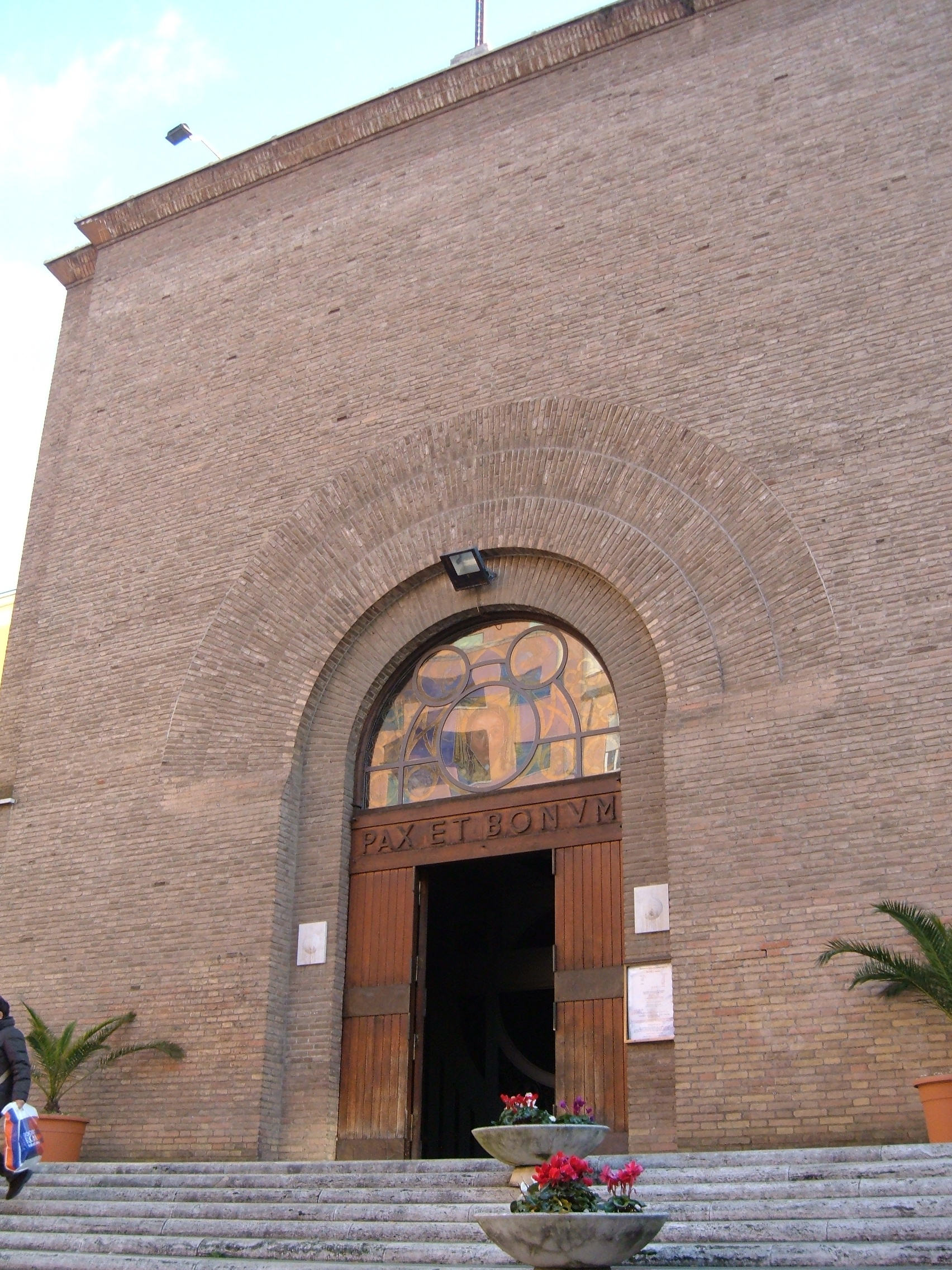 Chiesa di Sant'Ippolito, a Roma, nel quartiere Nomentano.